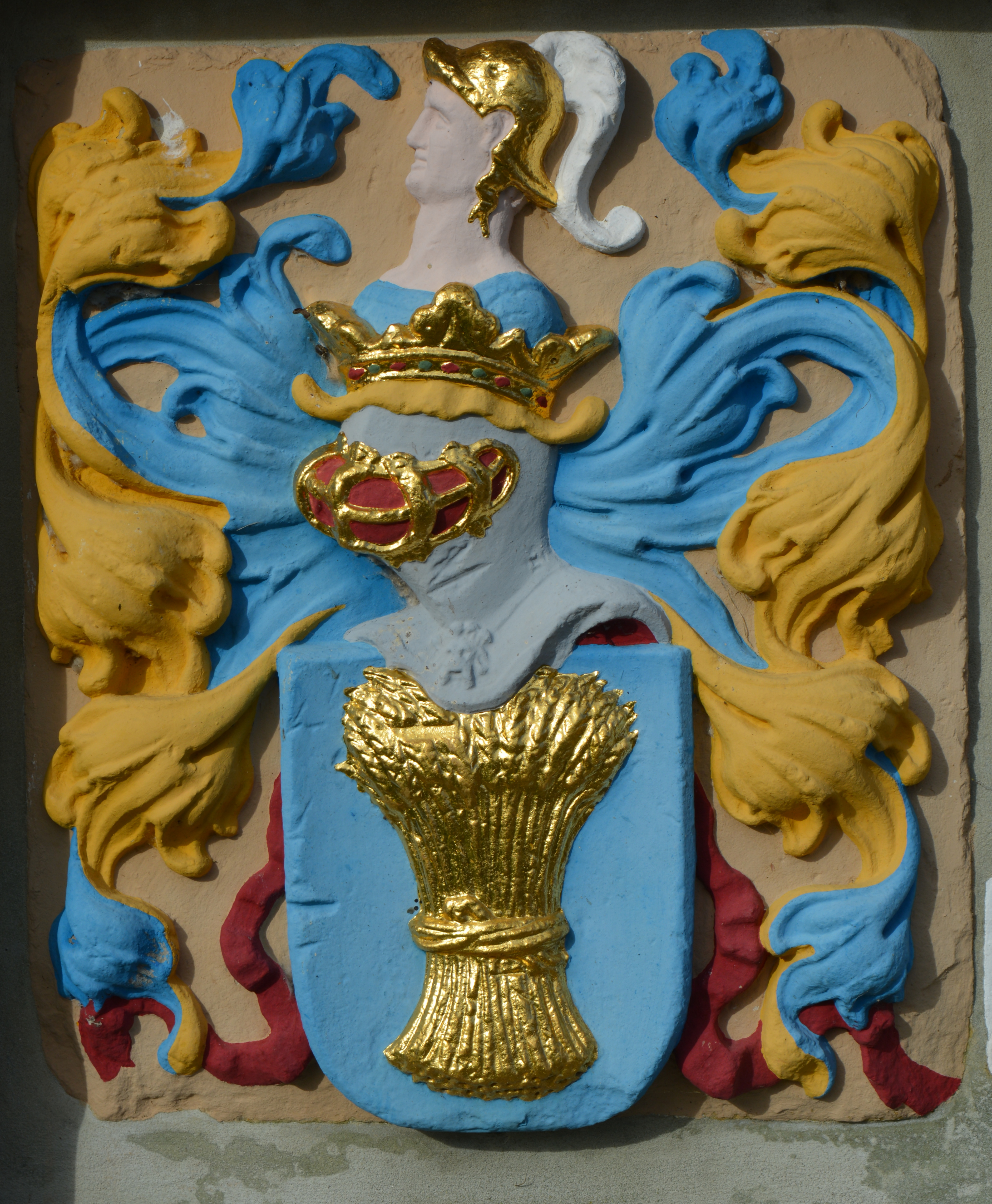 Nicolaaskerk, Swichum, gevelsteen afkomstich van het Aytta-Godshuis